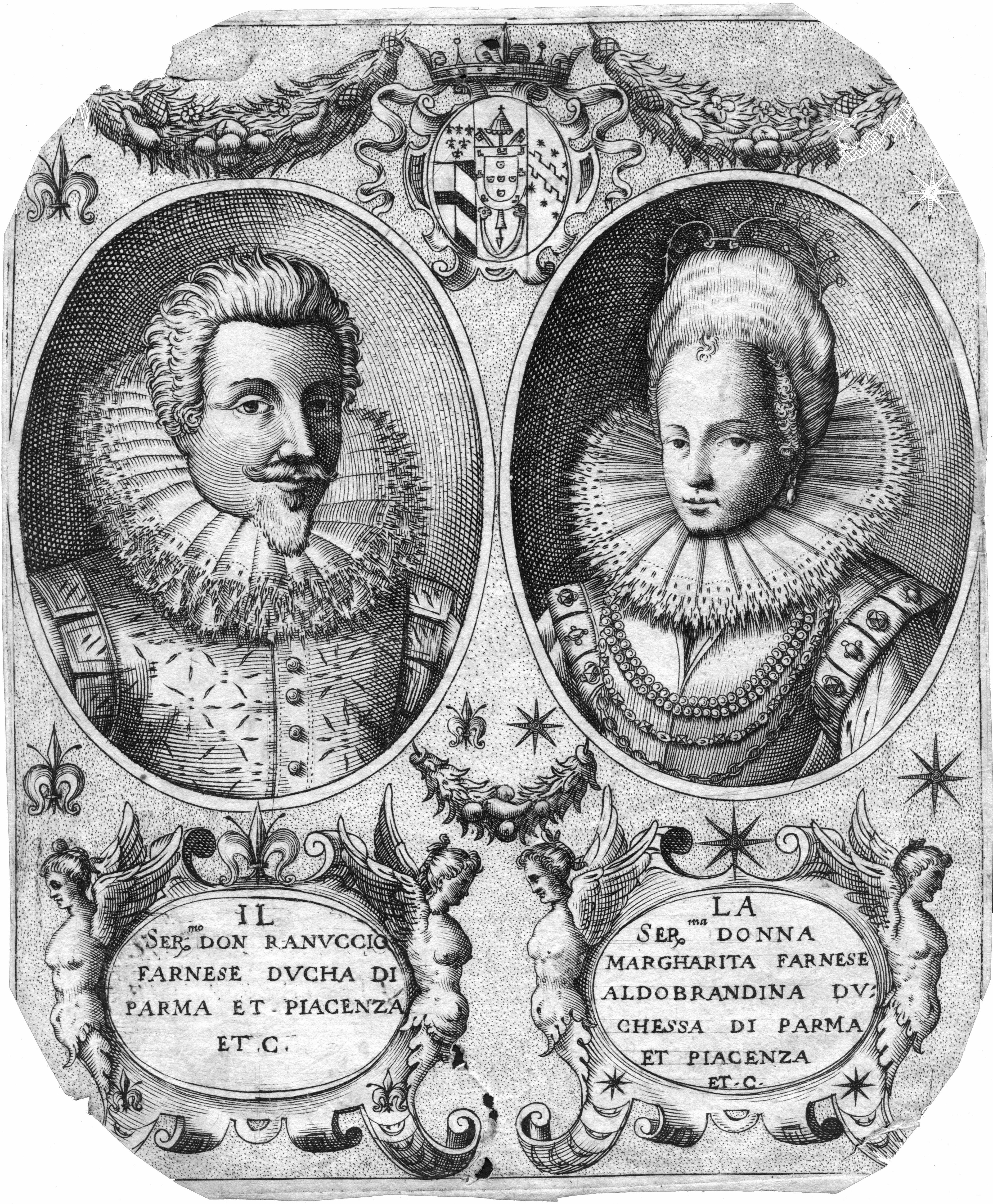 portrait gravé